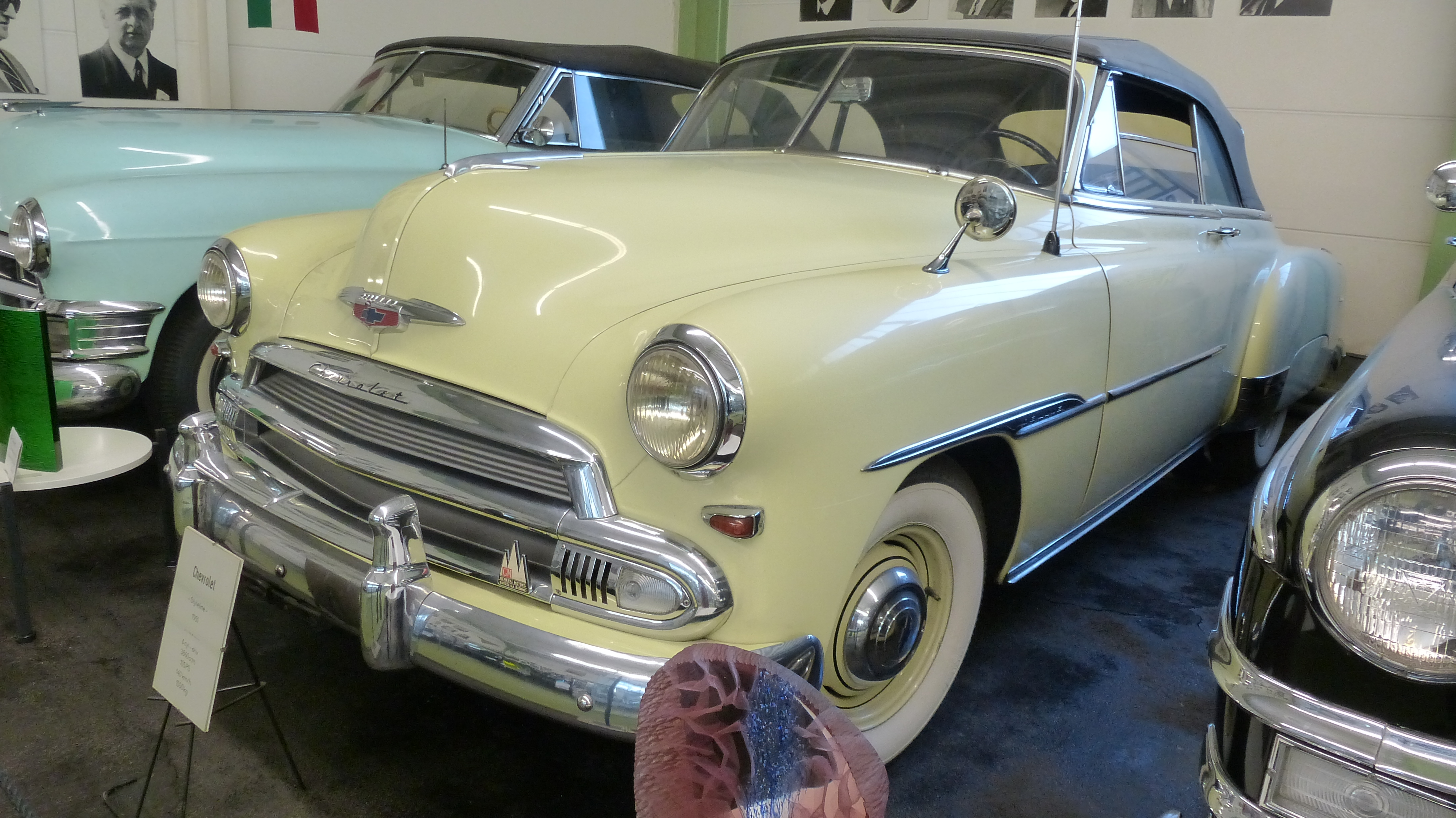 Chevrolet Styleline 1951 (General Motors Suisse)